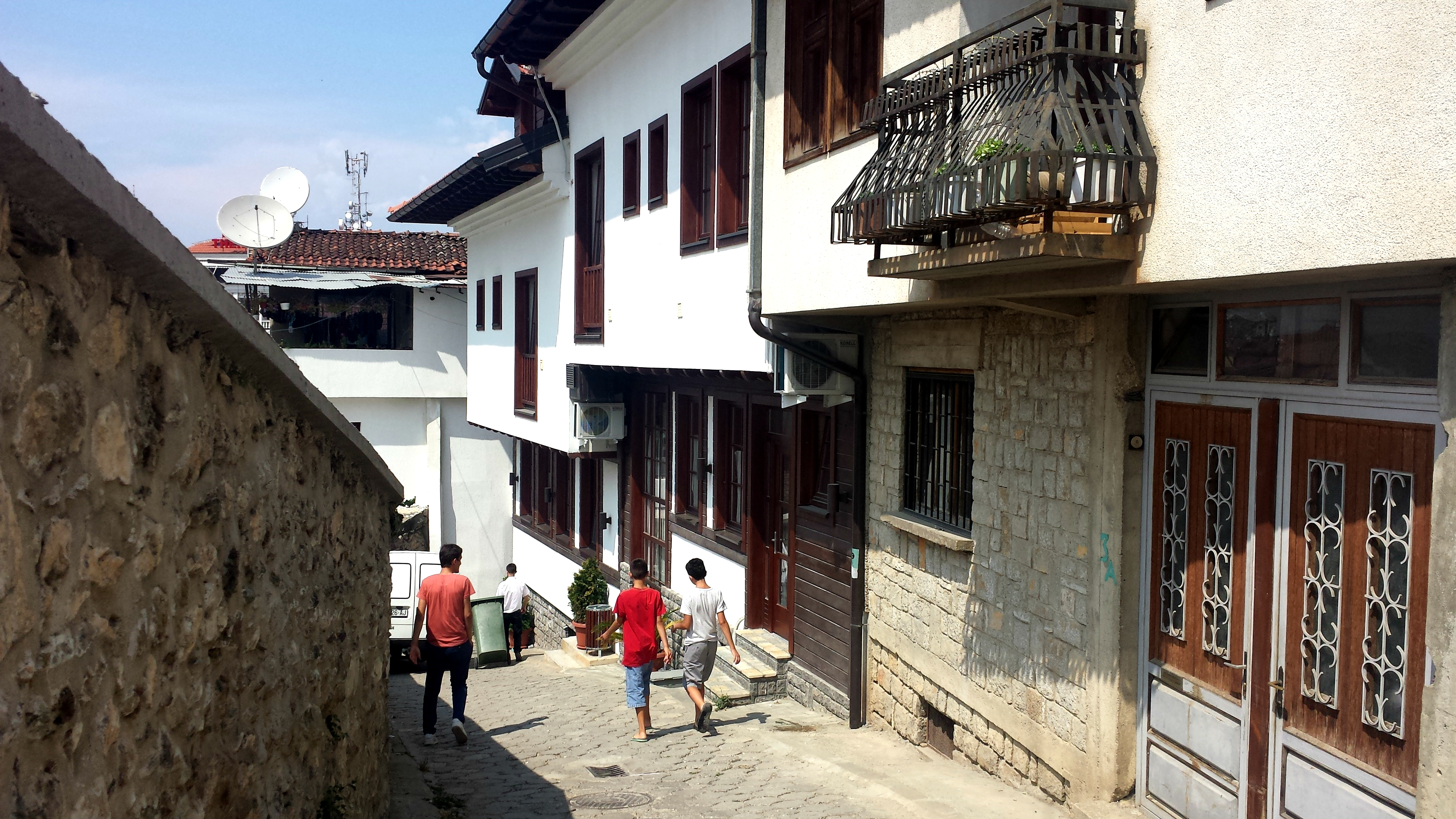 Qendra historike e Prizrenit